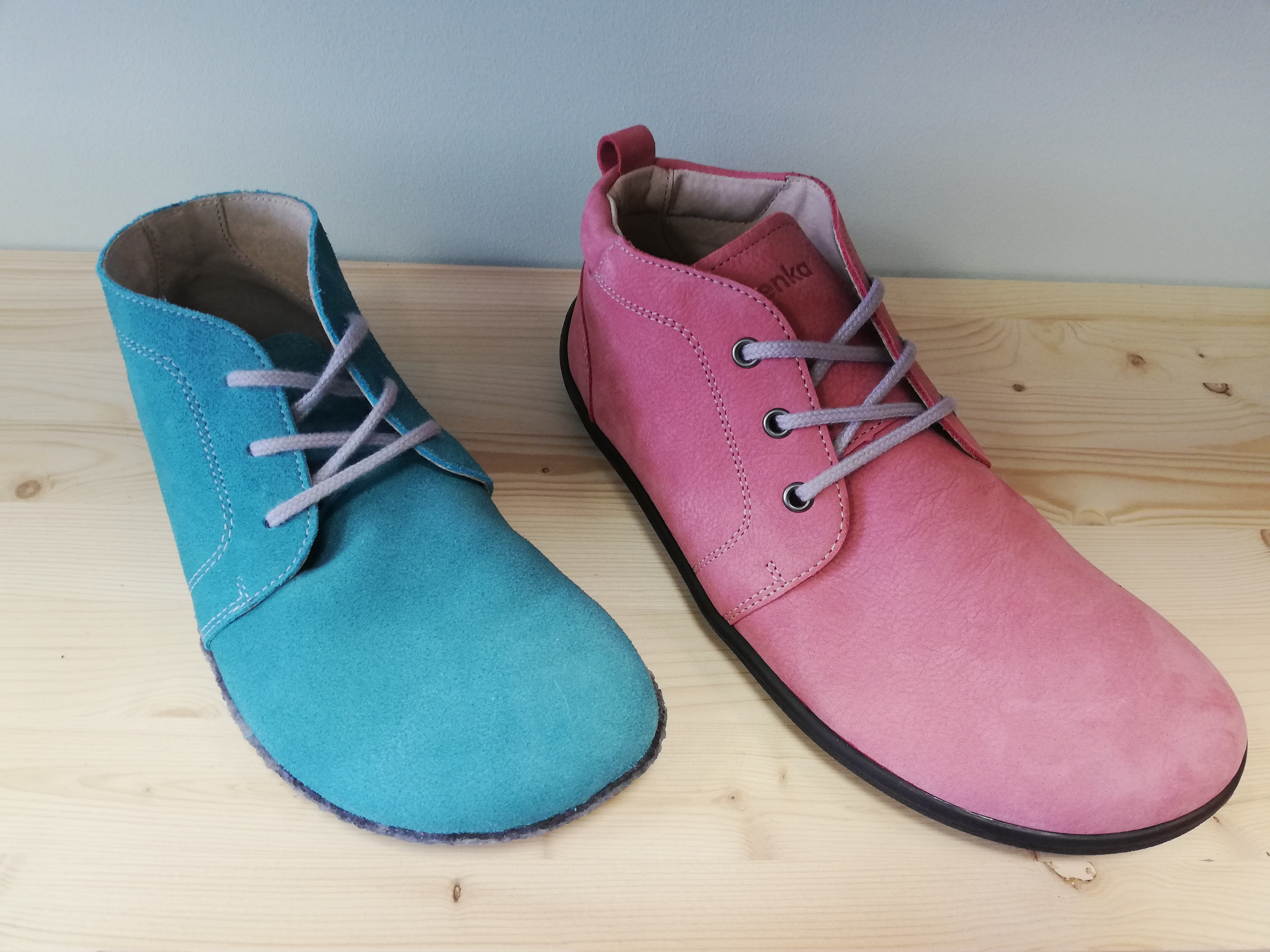 Paljajalajalanõud